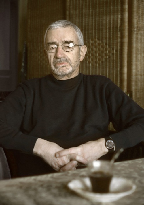 Bodor Ádám Kossuth-díjas erdélyi magyar író, a Digitális Irodalmi Akadémia alapító tagja.